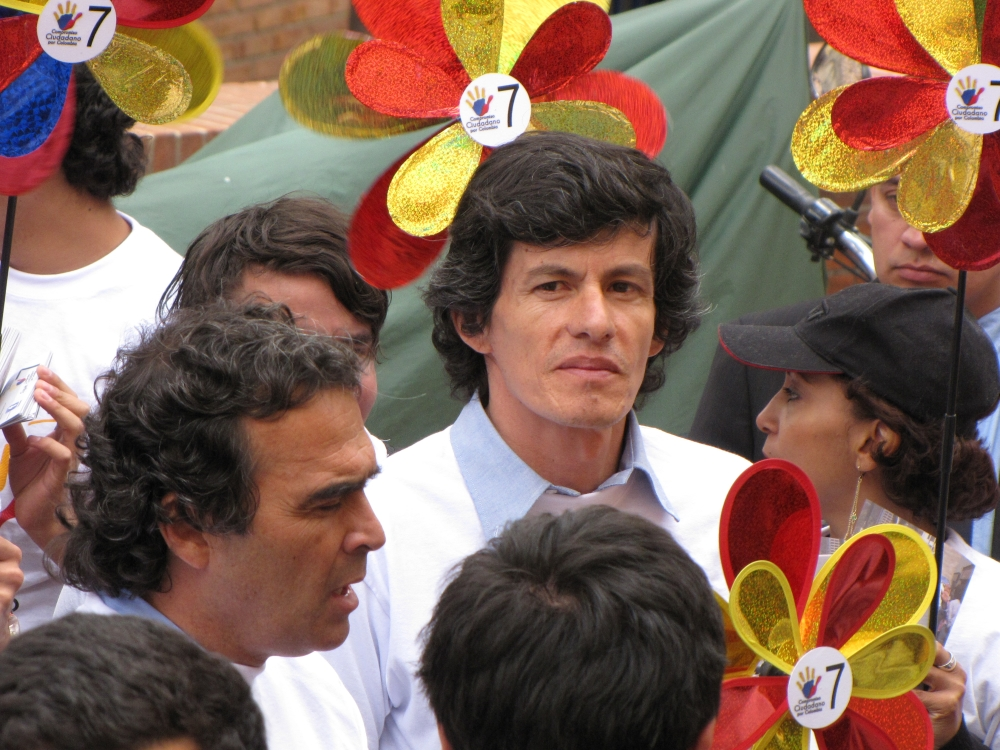 Juan Carlos Flórez, Concejal de Bogotá, junto a Sergio Fajardo, Gobernador de Antioquia.